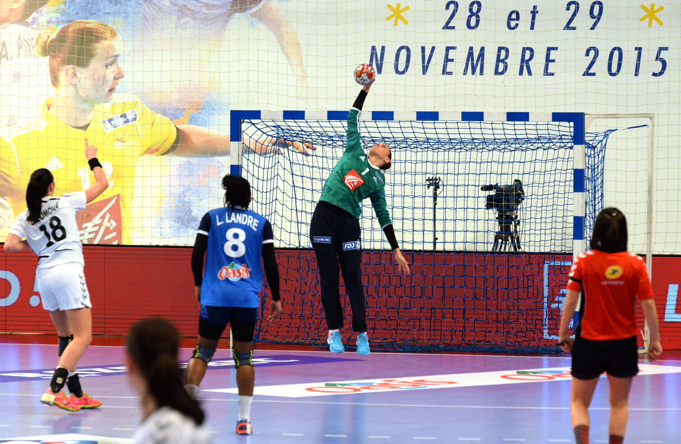 Laura Glauser ,le 29 novembre 2015, lors du match France / République Tchèque pour le compte du TIPIFF 2015. Au stade Pierre de Coubertin à Paris.